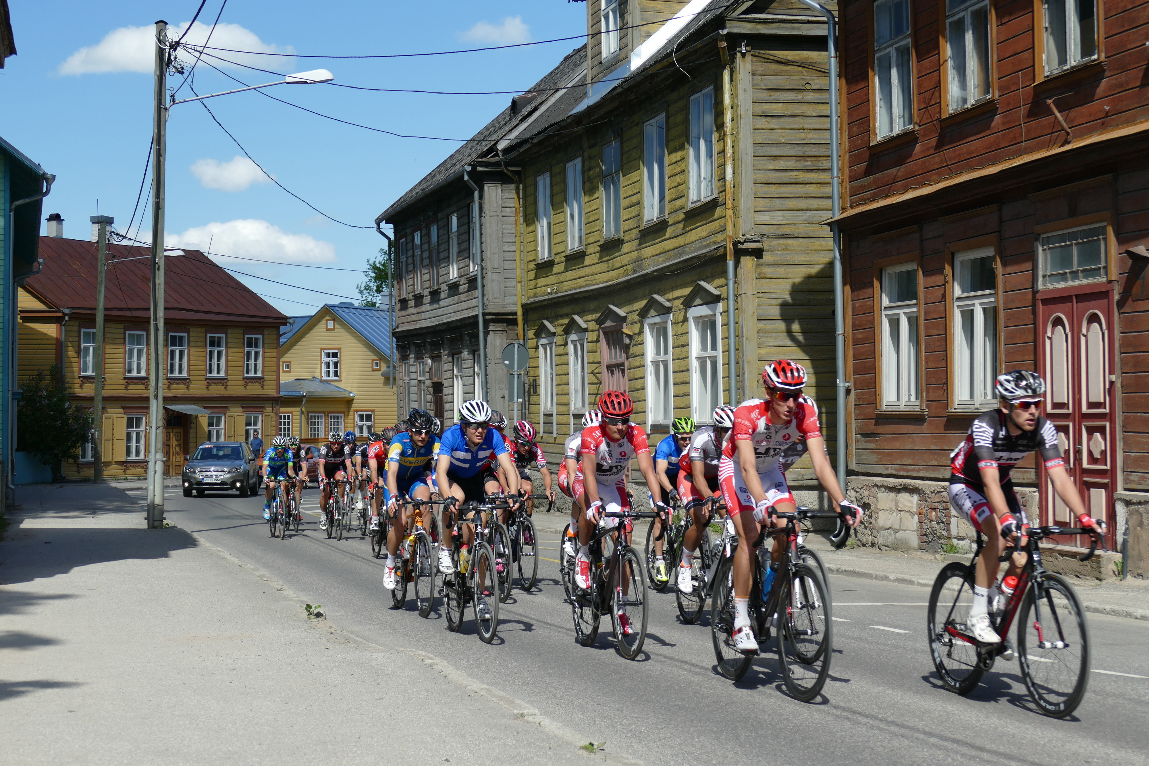 Tour of Estonia Tartu Grand Prix 2. etapp Tartu tänavatel 30.05.2015. Grupisõit 150km.